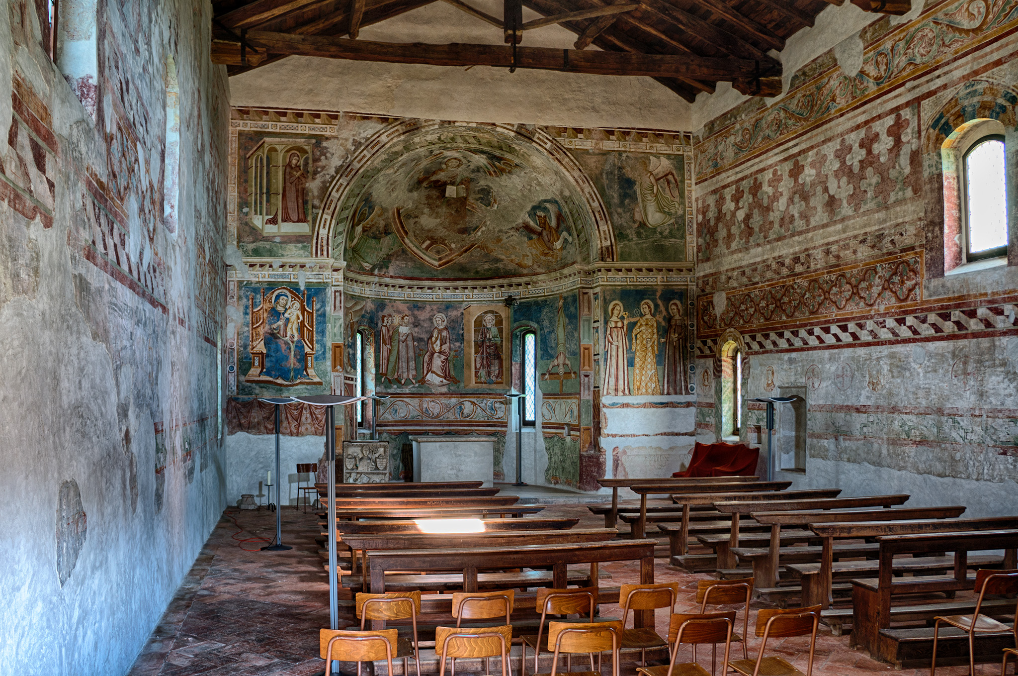 Interno della chiesa rossa